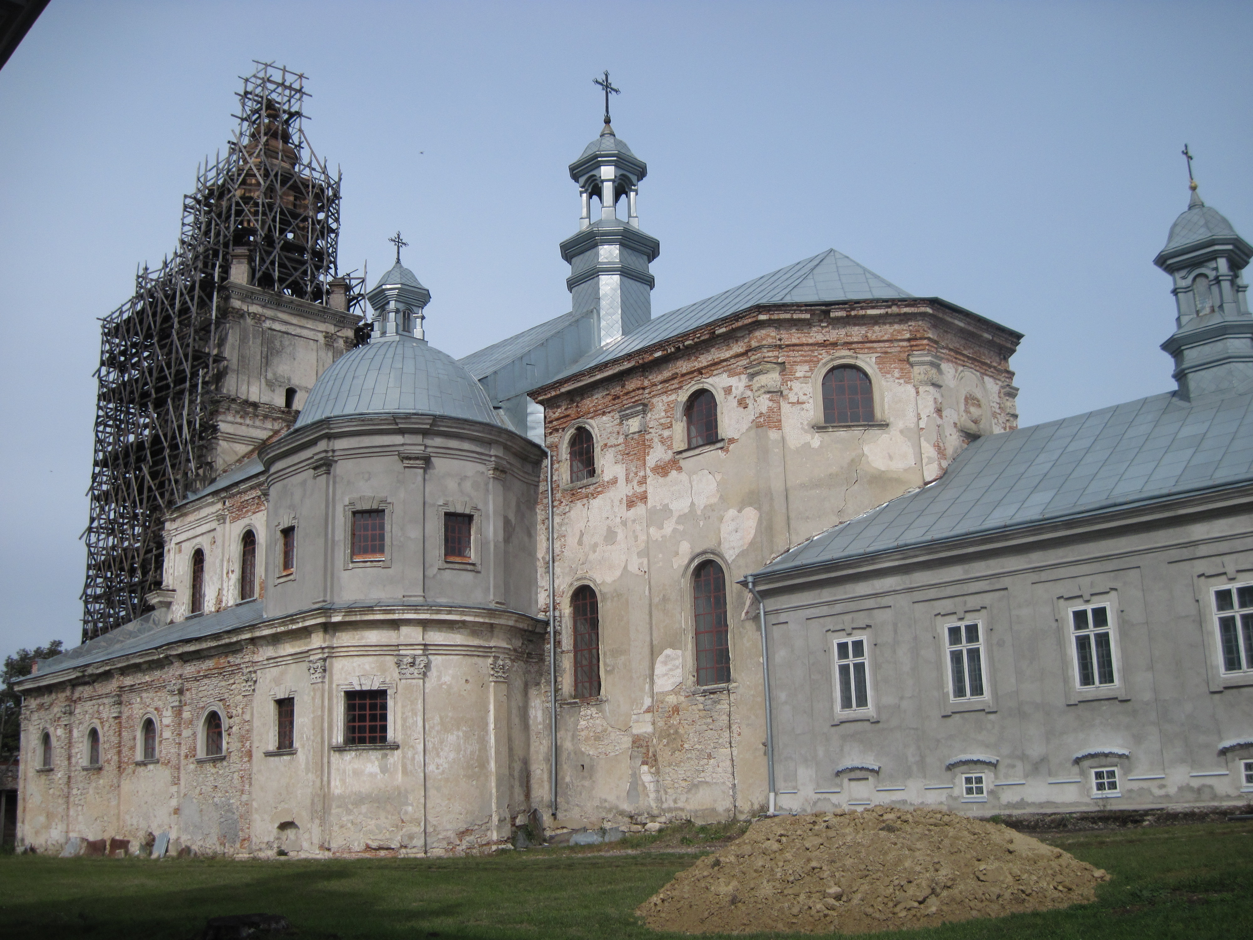 Костел, Підкамінь, осінь 2014